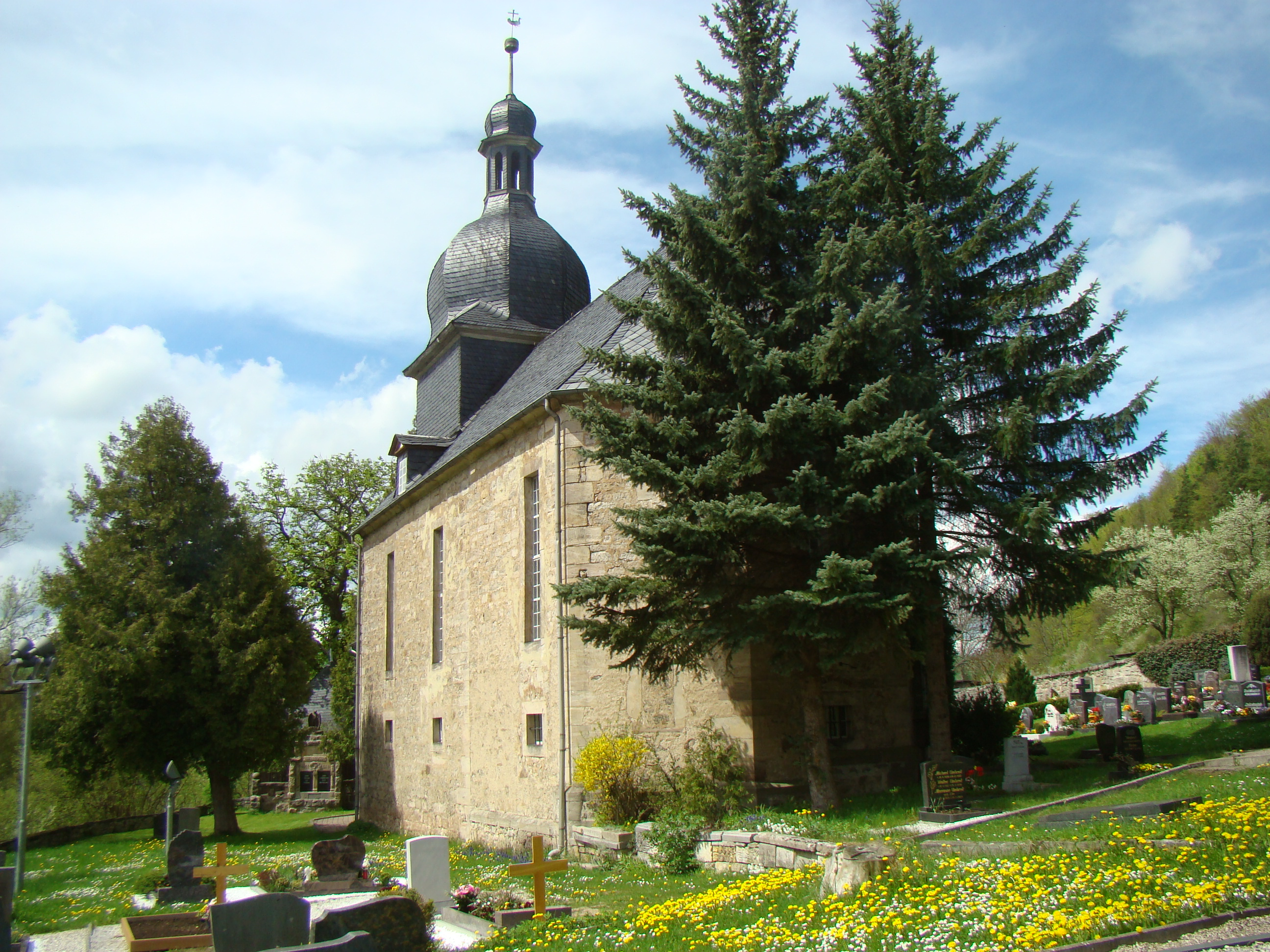 Kirche in Martinroda (Ilm-Kreis)